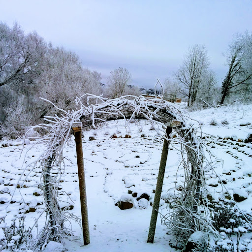 Otepää kivilabürint